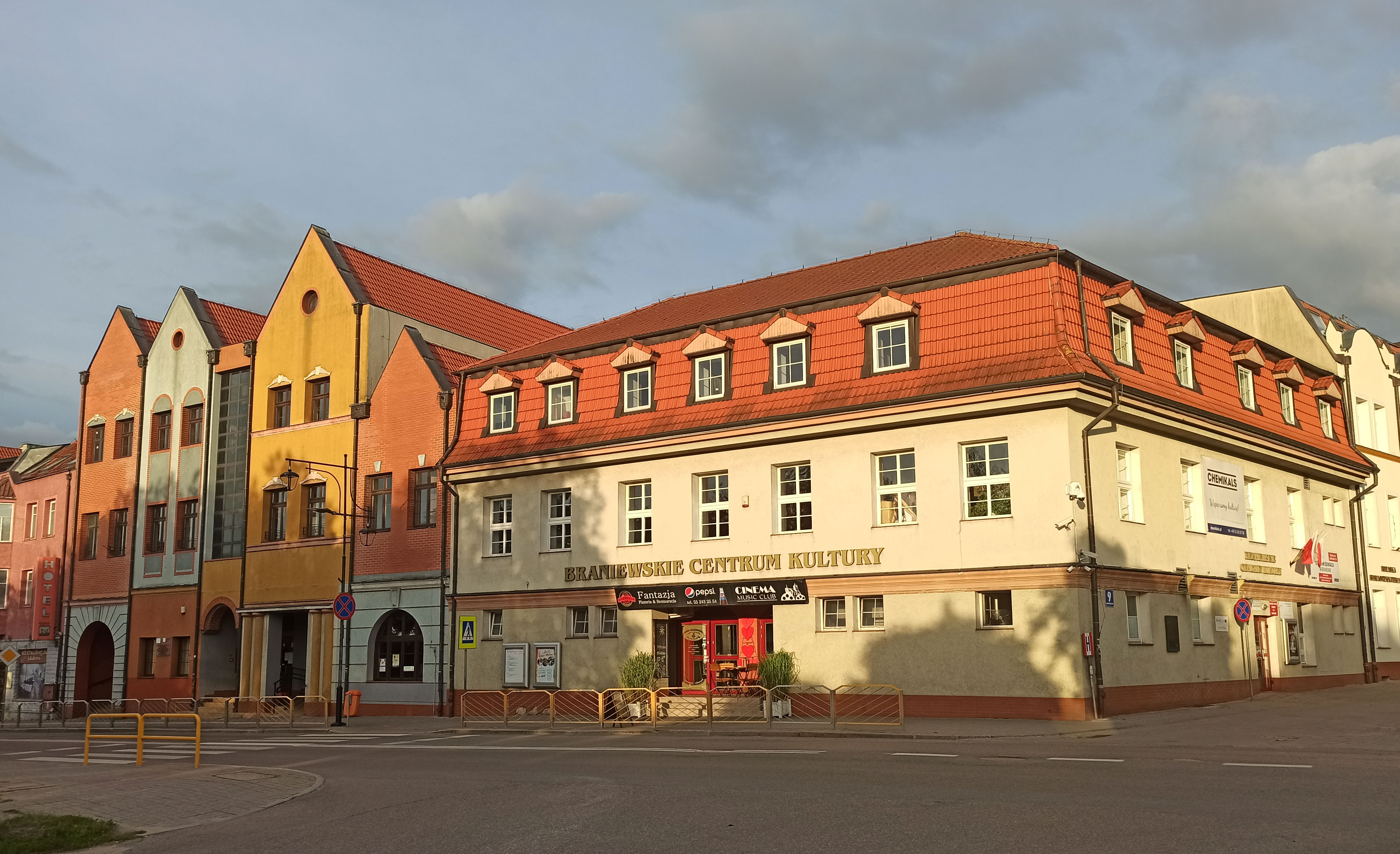 Braniewo BCK 2020 Braniewskie Centrum Kultury